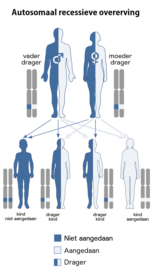 Autosomaal overervingspatroon